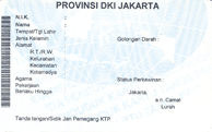 KTP untuk Warga Negara Indonesia